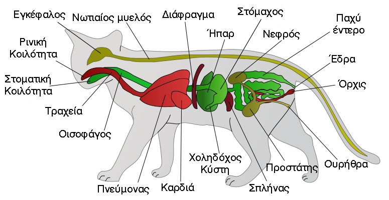 Anatomy of male cat